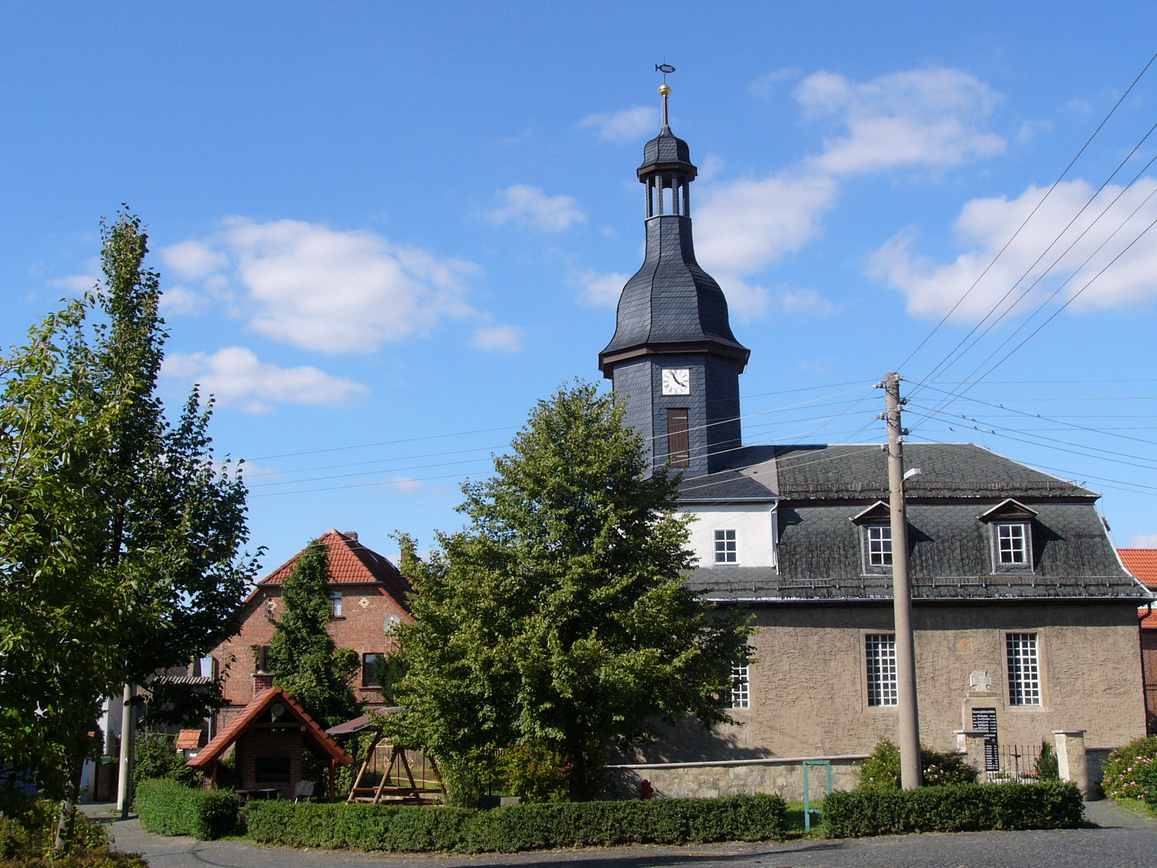 Dorfplatz mit Kirche und Backofen, Stiebritz, Gemeinde Hainichen, Thüringen, Deutschland